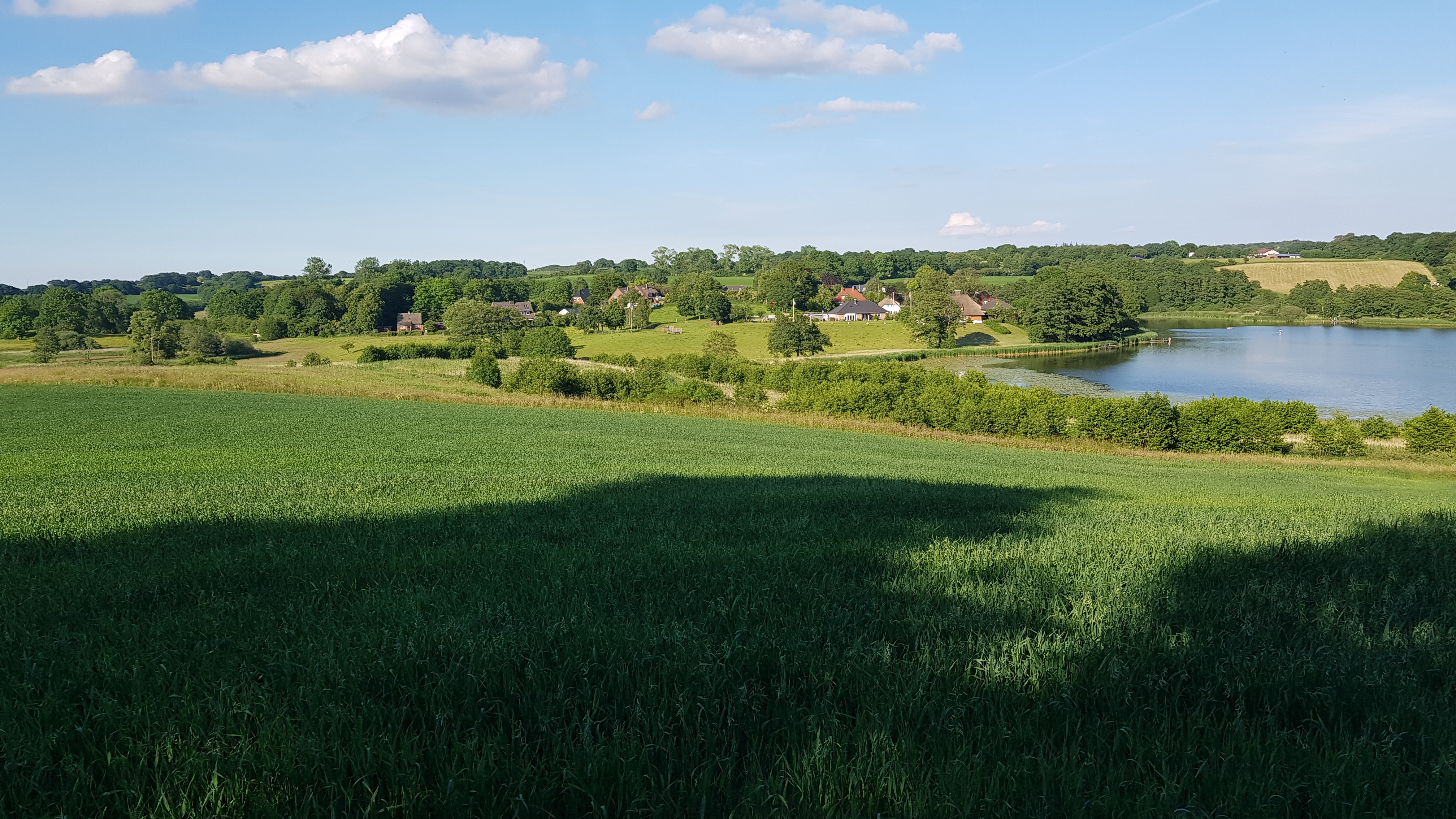 Den tyske landsby Nyhus set fra Gendarmstien